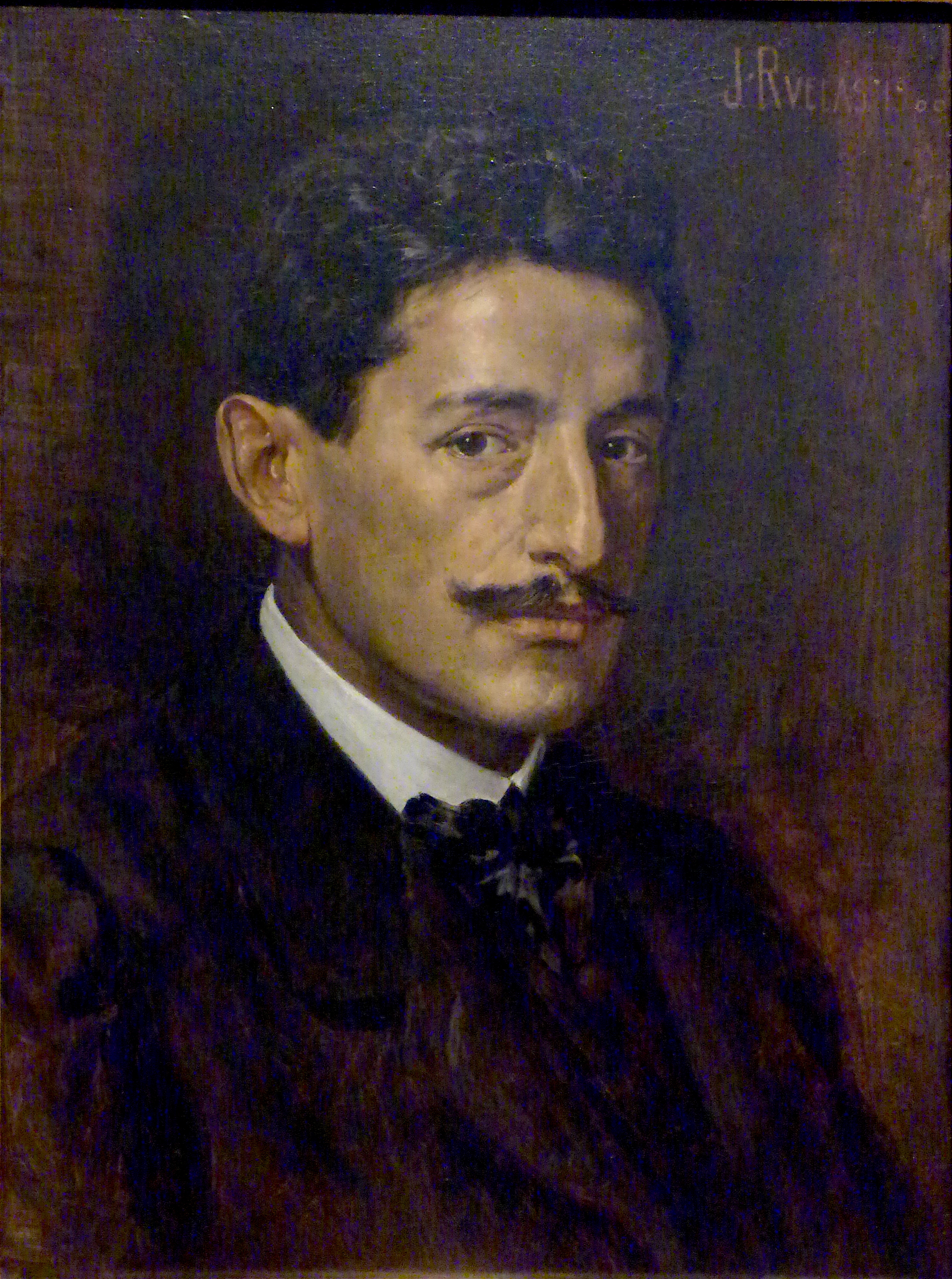 Autorretrato (1900) de Julio Ruelas en el MUNAL (México)